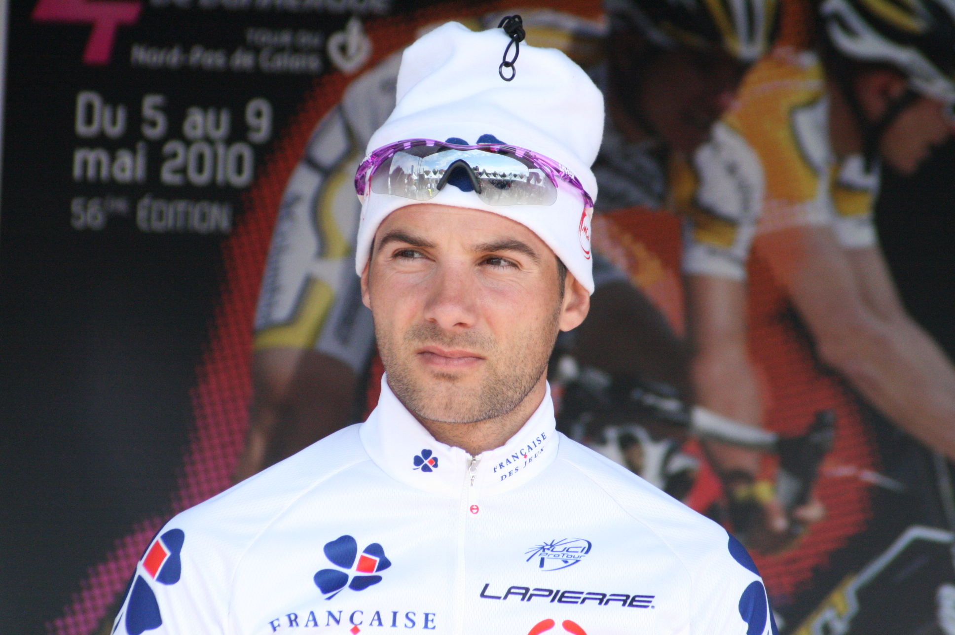 Olivier Bonnaire, lors de la présentation des équipes des 4 jours de Dunkerque 2010